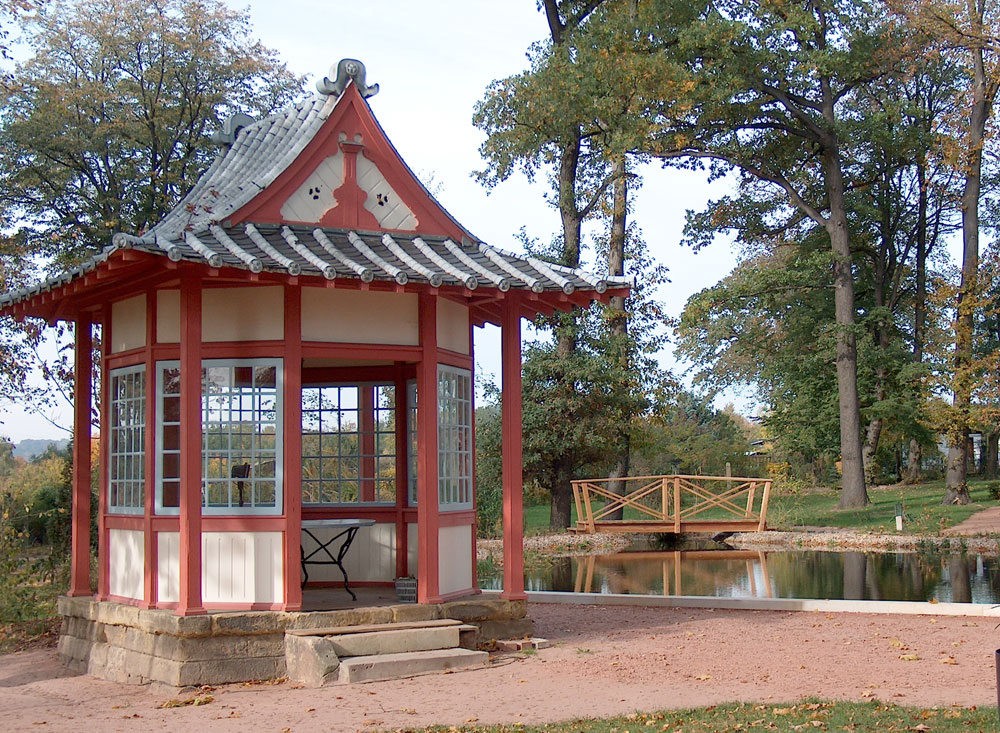 Der Park der Villa Theresa in Coswig mit japanischem Teehaus und Teich